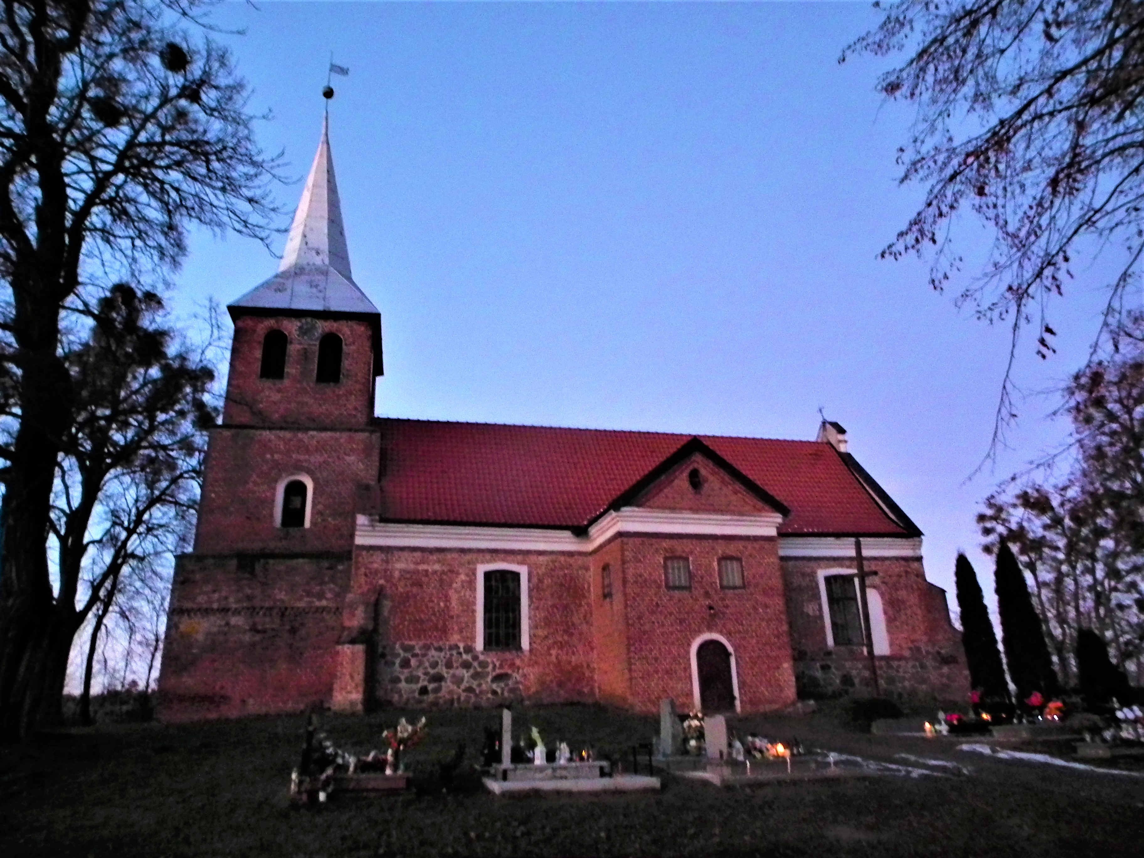 Kościół św. Piotra i Pawła w Starym Mieście w gm. Stary Dzierzgoń.